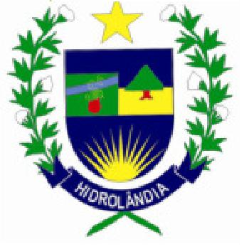 Foto